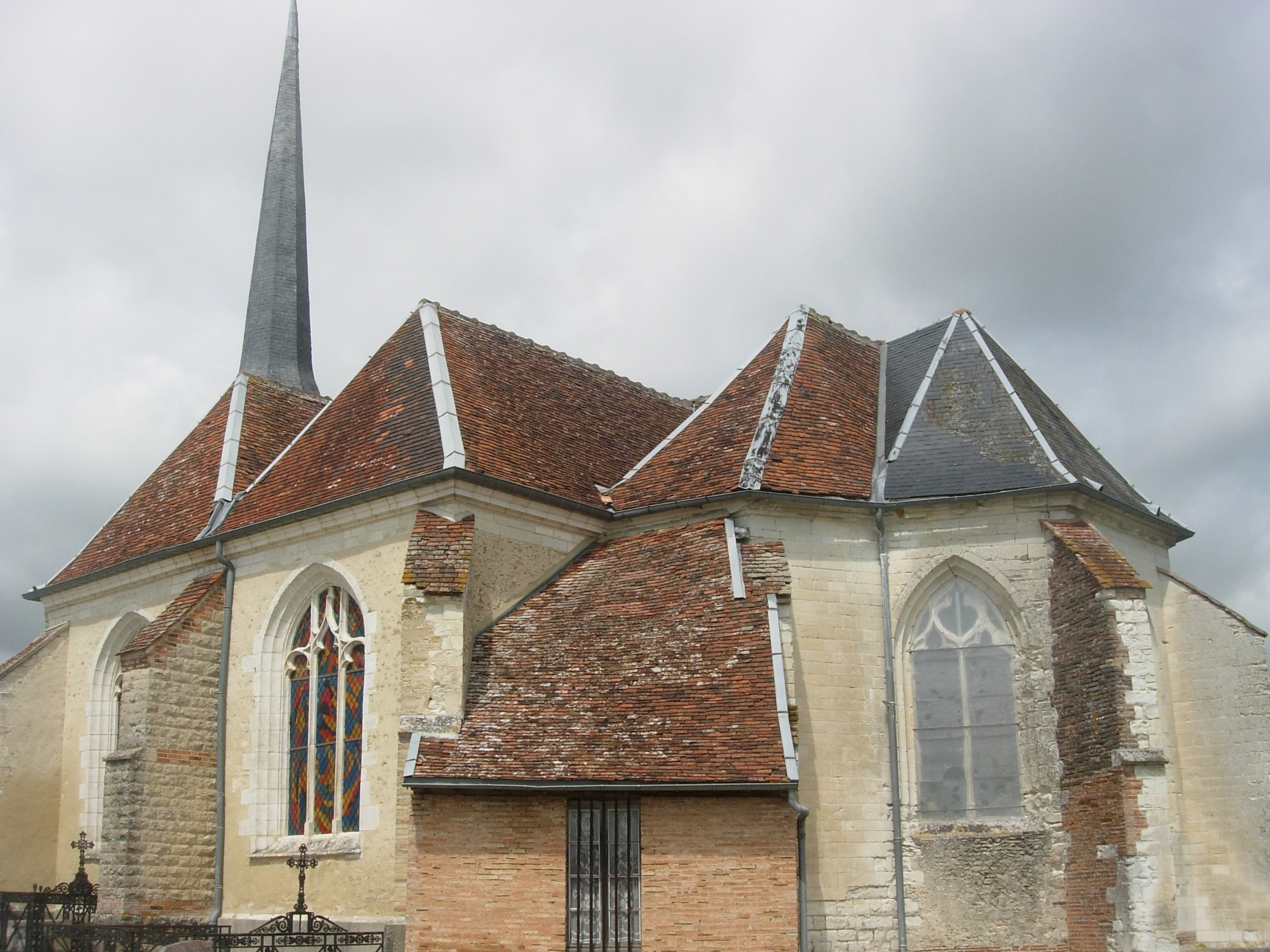 Eglise de Montaulin (Aube)